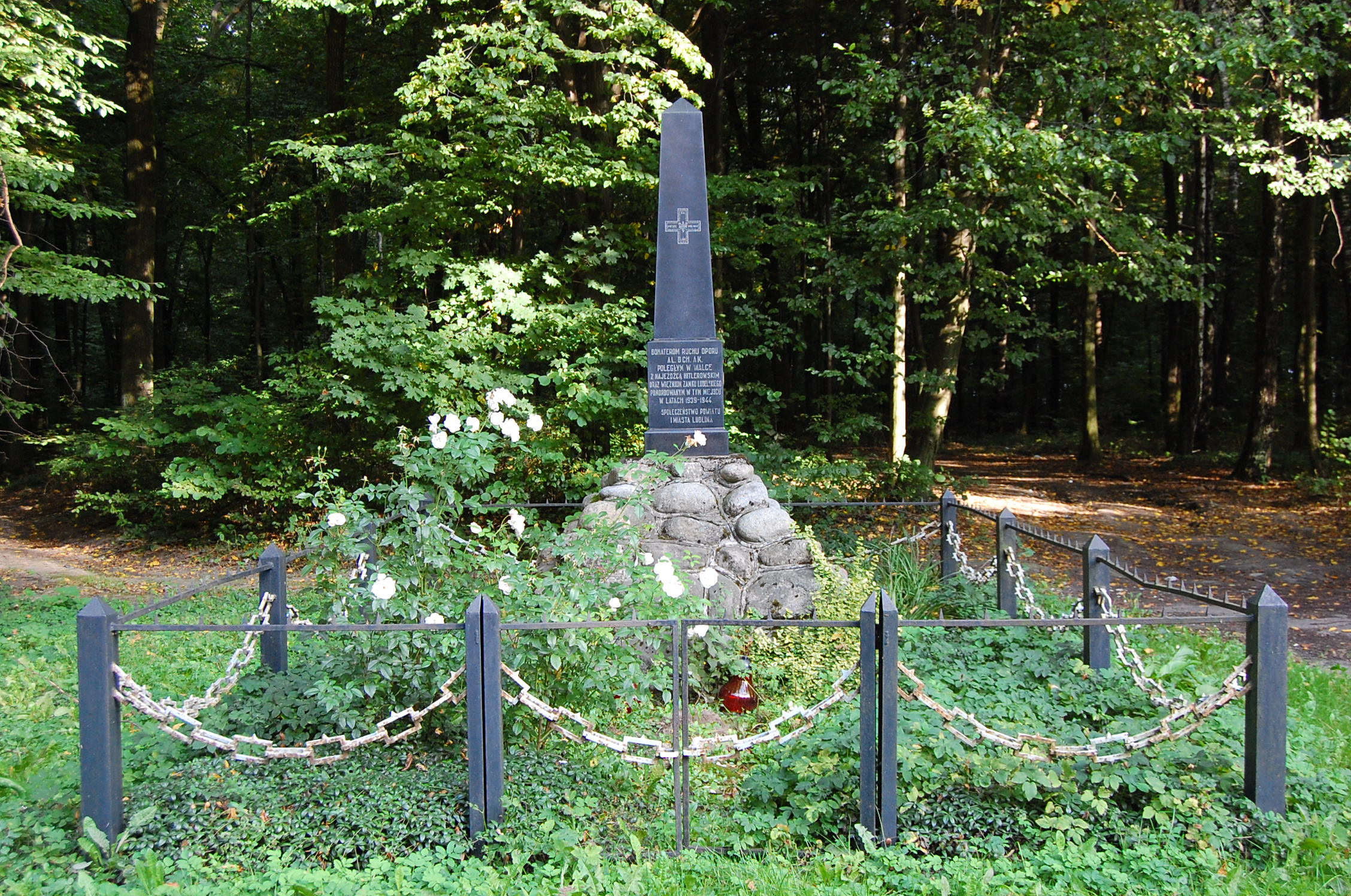 Pomnik u czci bohaterów ruchu oporu poległych w latach 1939-1944